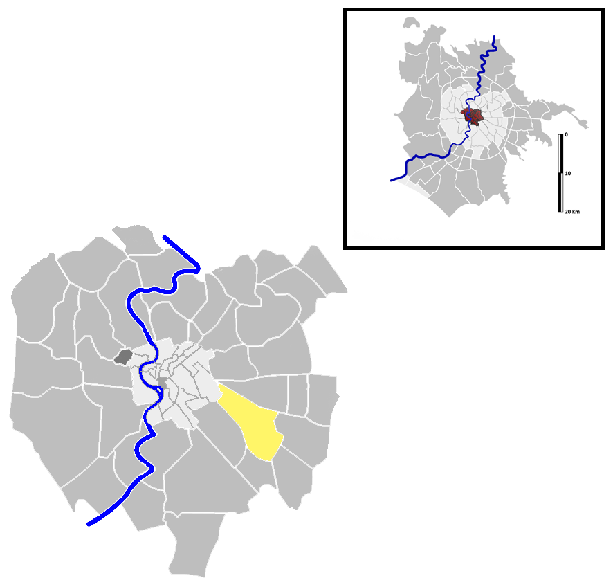 Tuscolano